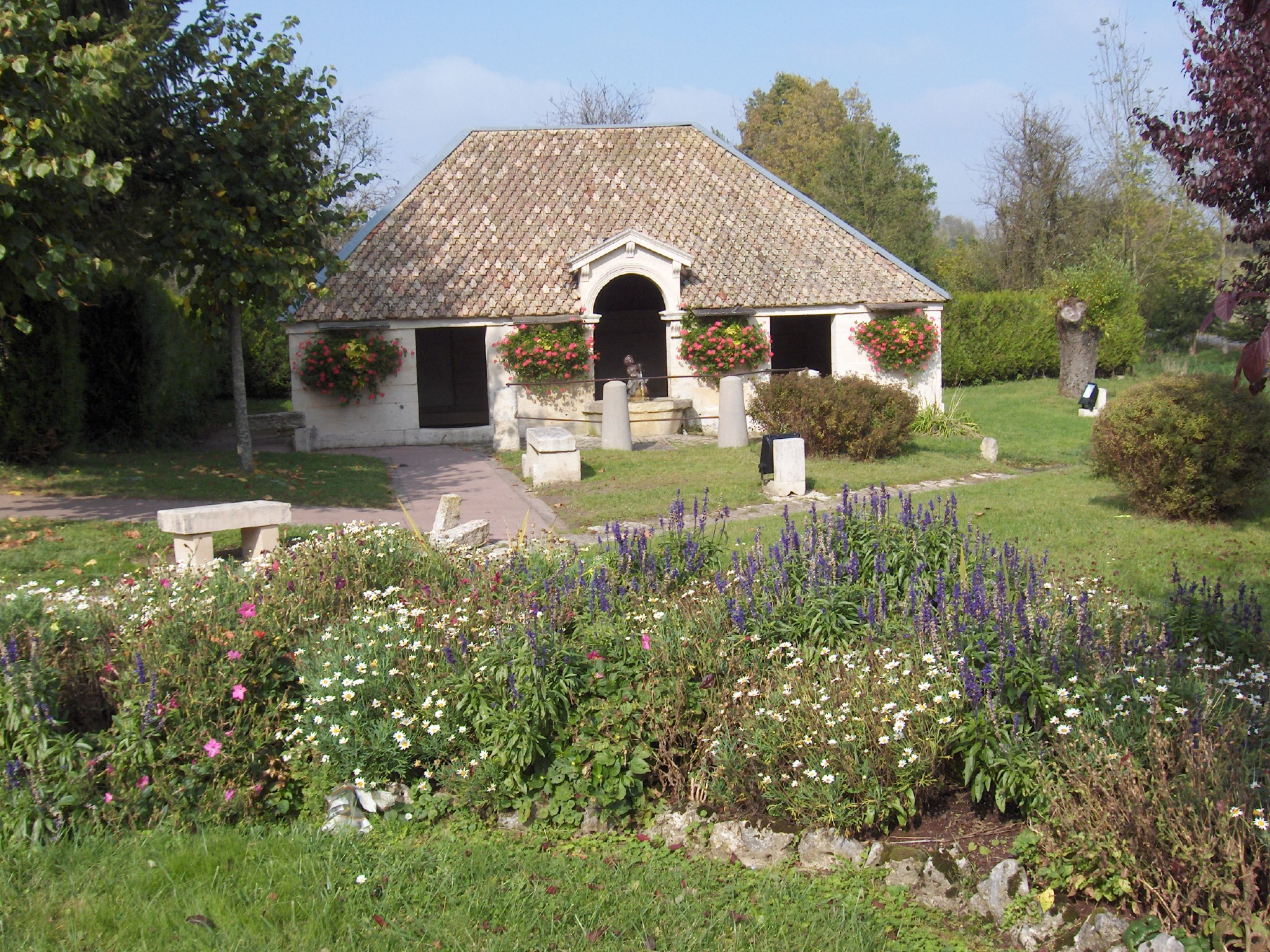 le lavoir de Mandres-en-Barrois (Meuse, France)